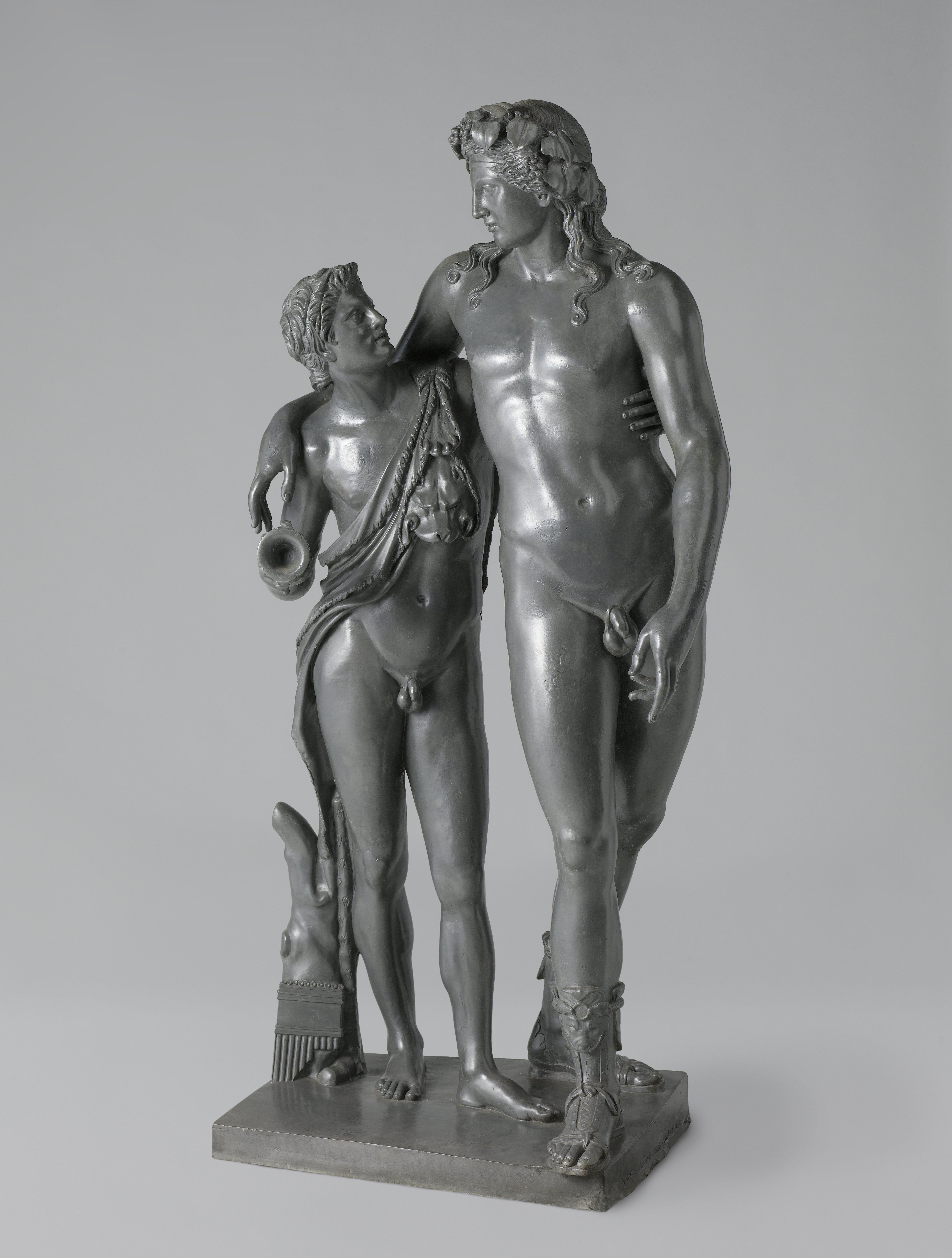 De wijngod Bacchus werd verliefd op de jonge sater Ampelos. Toen deze bij een tragisch ongeval stierf veranderde de bedroefde god hem in een druif en maakte wijn uit zijn bloed. Hiernaar verwijst de wijnkelk in Ampelos’ hand.